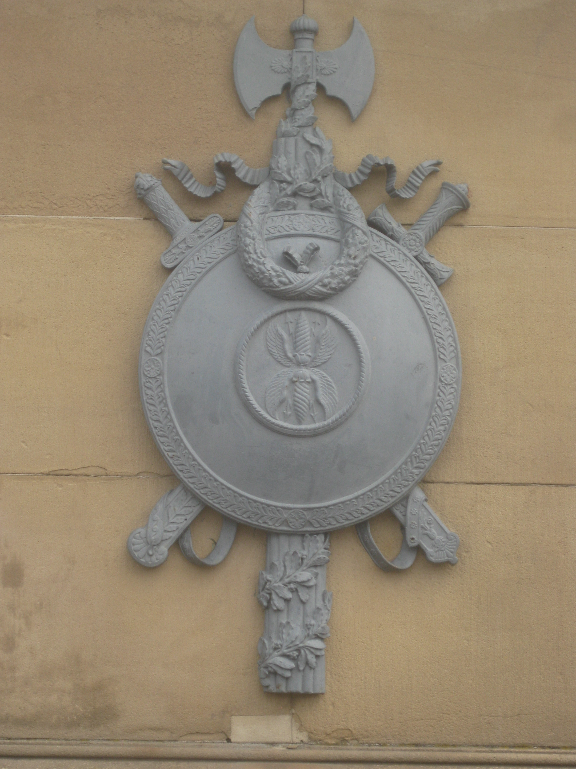 Trophäe am Postament des Hirschstandbilds am Eingang zum Ehrenhof des Neuen Schlosses Stuttgart, 2011.